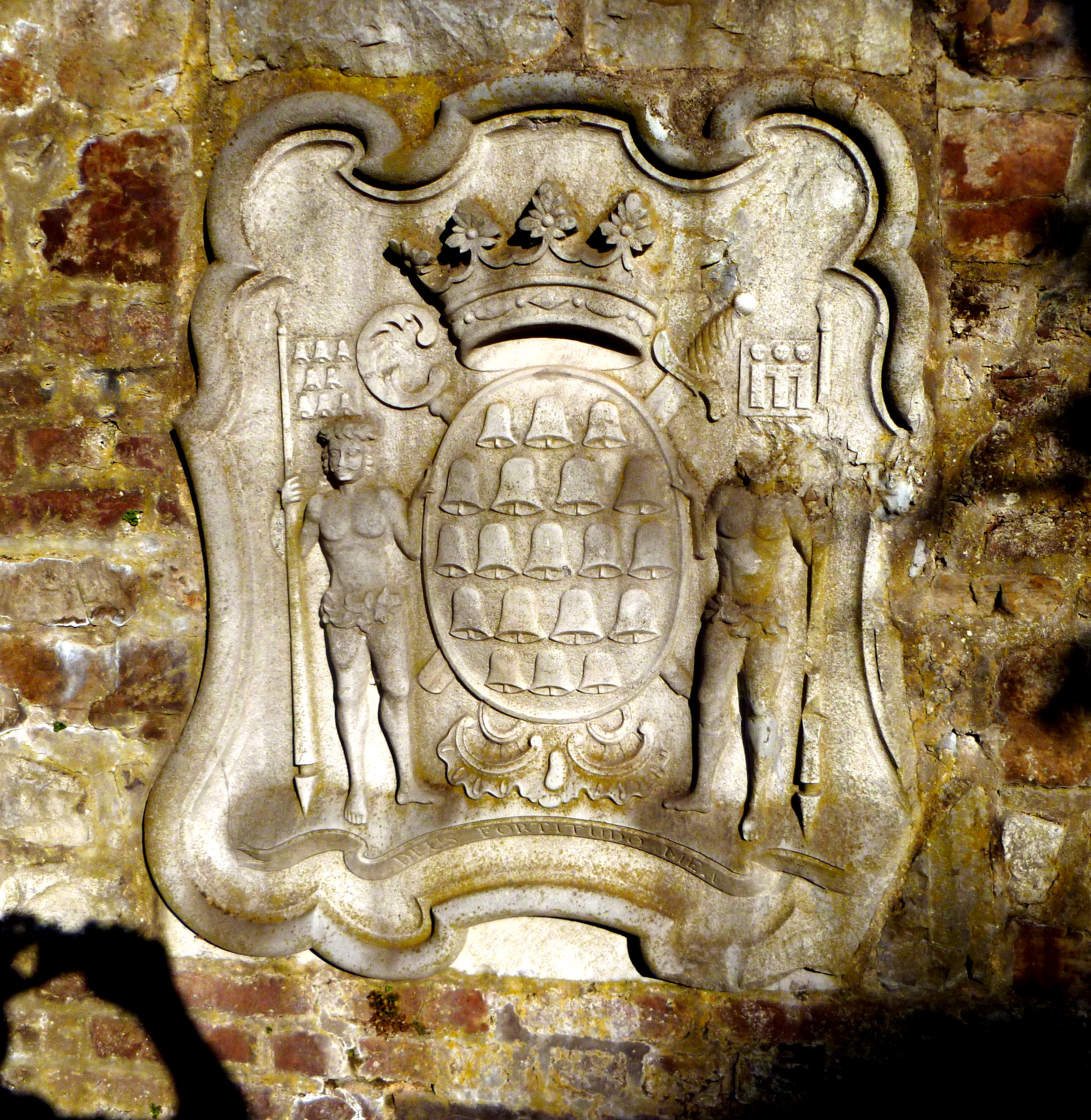 Wappenstein der Äbtissin Anna Francisca d’Awans de Lonchin de Flemalle in der Mauer der Abtei Burtscheid. Vermutlich wurde hier die Tingierung des Wappens von Awans (Eisenhutfeh-Pelzwerk) als Ansammlung von Glocken fehlinterpretiert